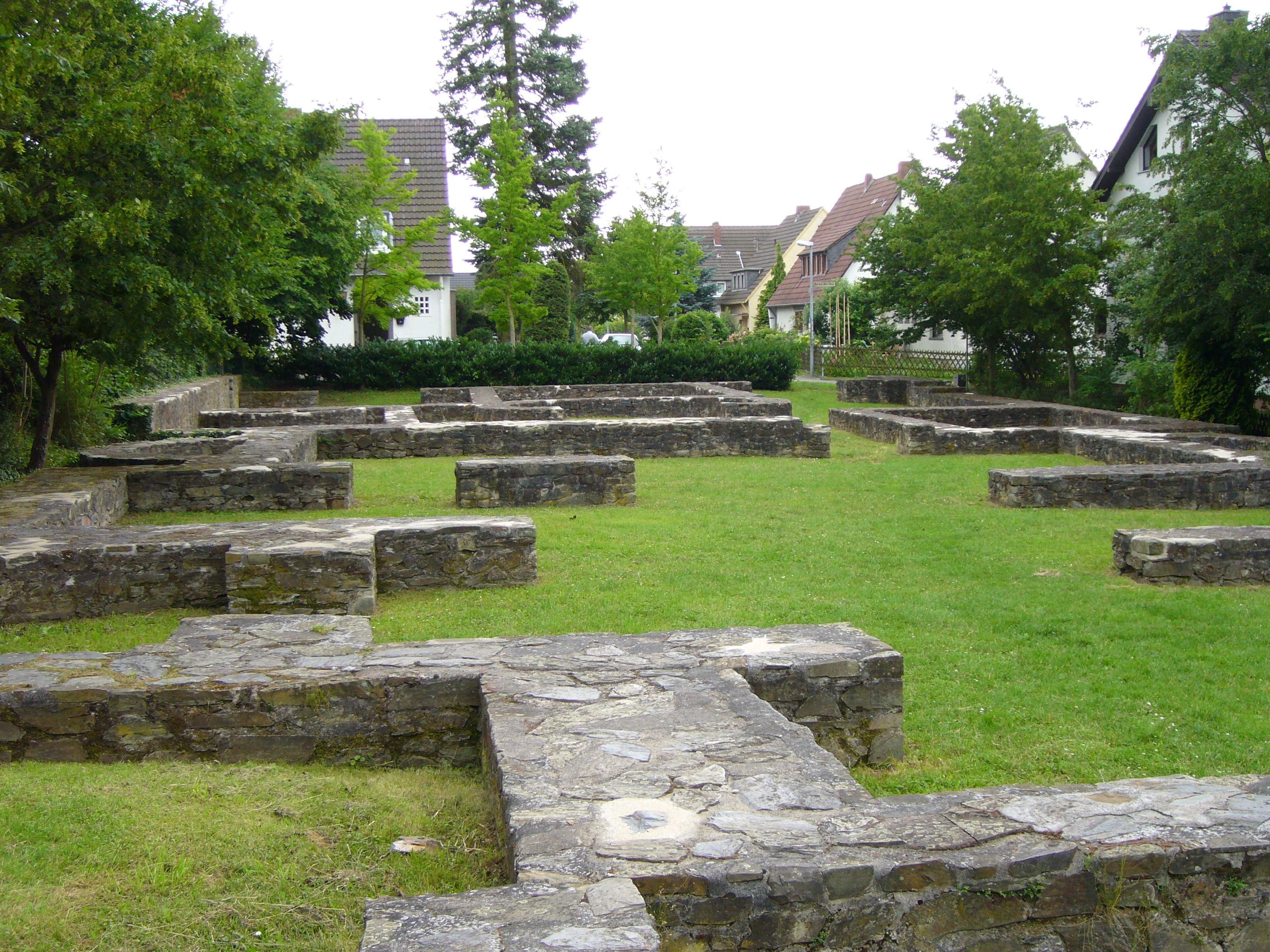 Grundmauern Römerkastell, Neuwied